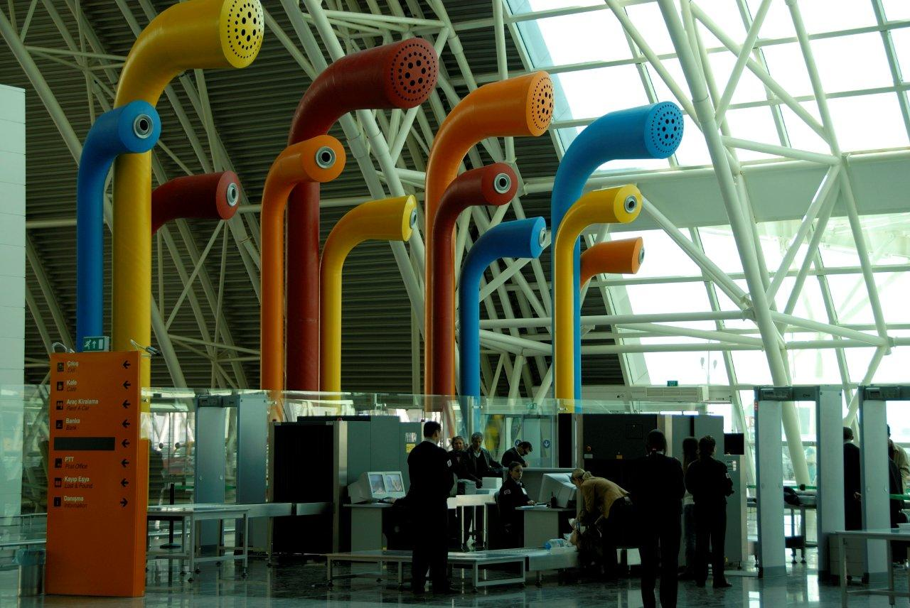 Adnan Menderes Havalimanı